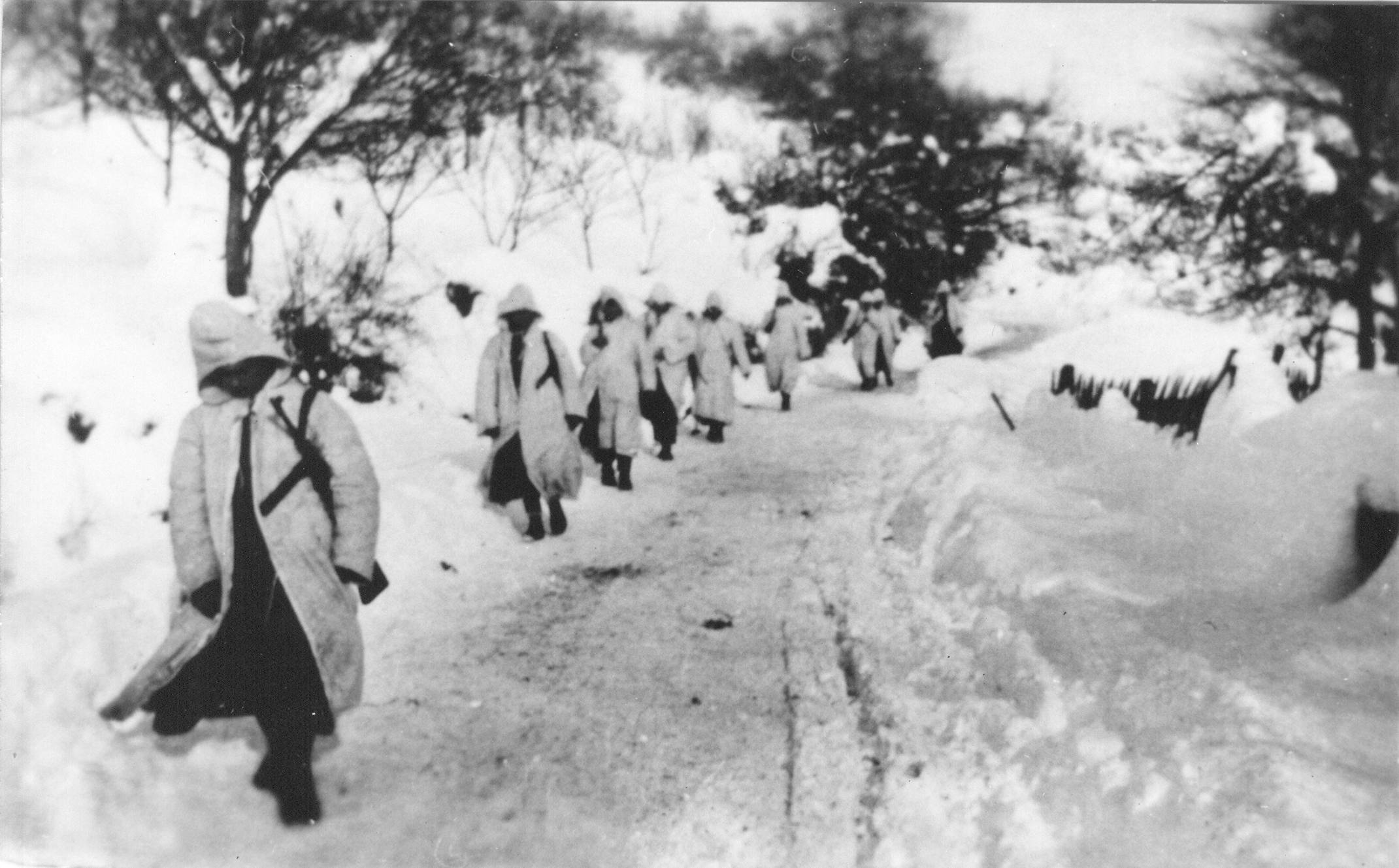 Srpskohrvatski / српскохрватски: Izviđačka grupa boraca VI krajiške NOU brigade u reonu Travnik - Vlašić 1944.